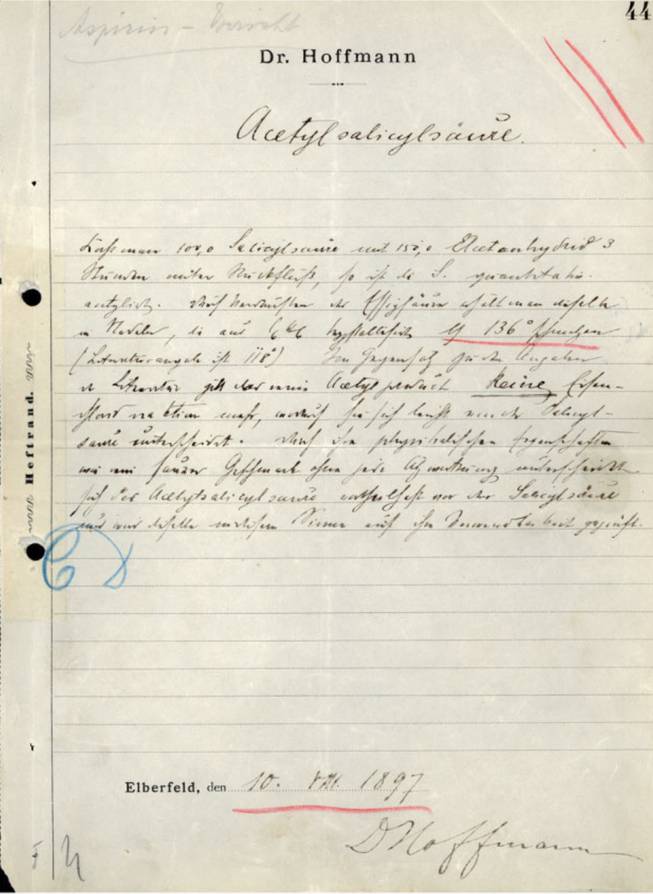 Laborjournal Felix Hoffmann (Blatt 44), Bayer, zur ersten ASS-Herstellung am 10. VIII. 1897 Felix Hoffmann (* 21. Januar 1868 in Ludwigsburg; † 8. Februar 1946 in Lausanne)